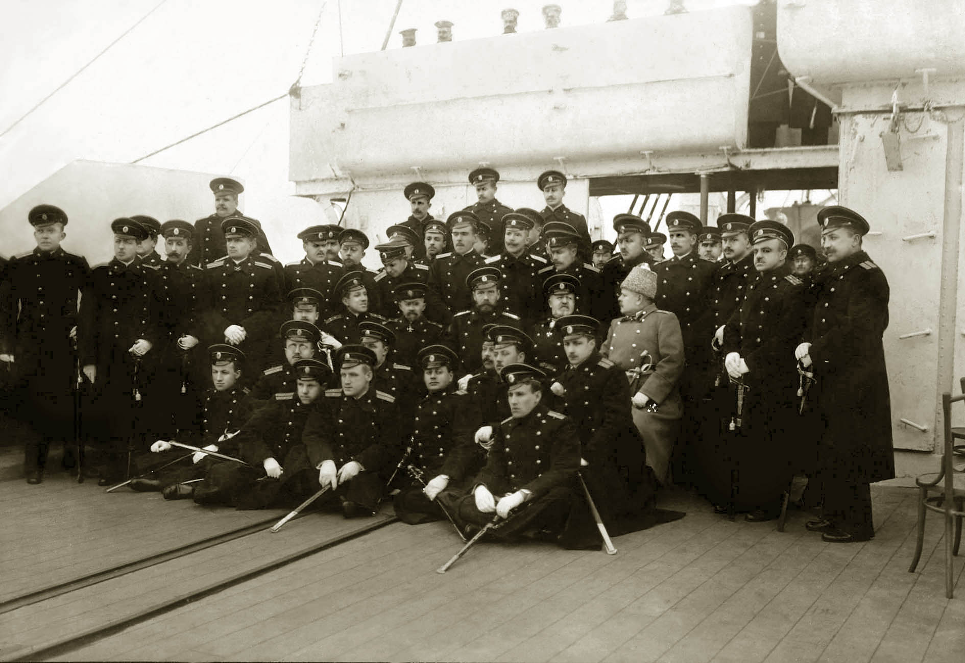 15.01.1915 г. Николай II на крейсере "Россия" среди офицеров штаба Балтийского флота. Слева от императора – нач. штаба, вице-адмирал Л. Кербер, справа – командующий флотом, адмирал Н. О. Эссен. Стоят: крайний справа - И. И. Ренгартен, рядом – князь Черкасский, затем – М. А. Кедров и А. С. Максимов. 5-й слева – А. В. Колчак. Рядом с Н. О. Эссеном, вероятно, обер-гофмаршал императорского двора граф П. К. Бенкендорф.